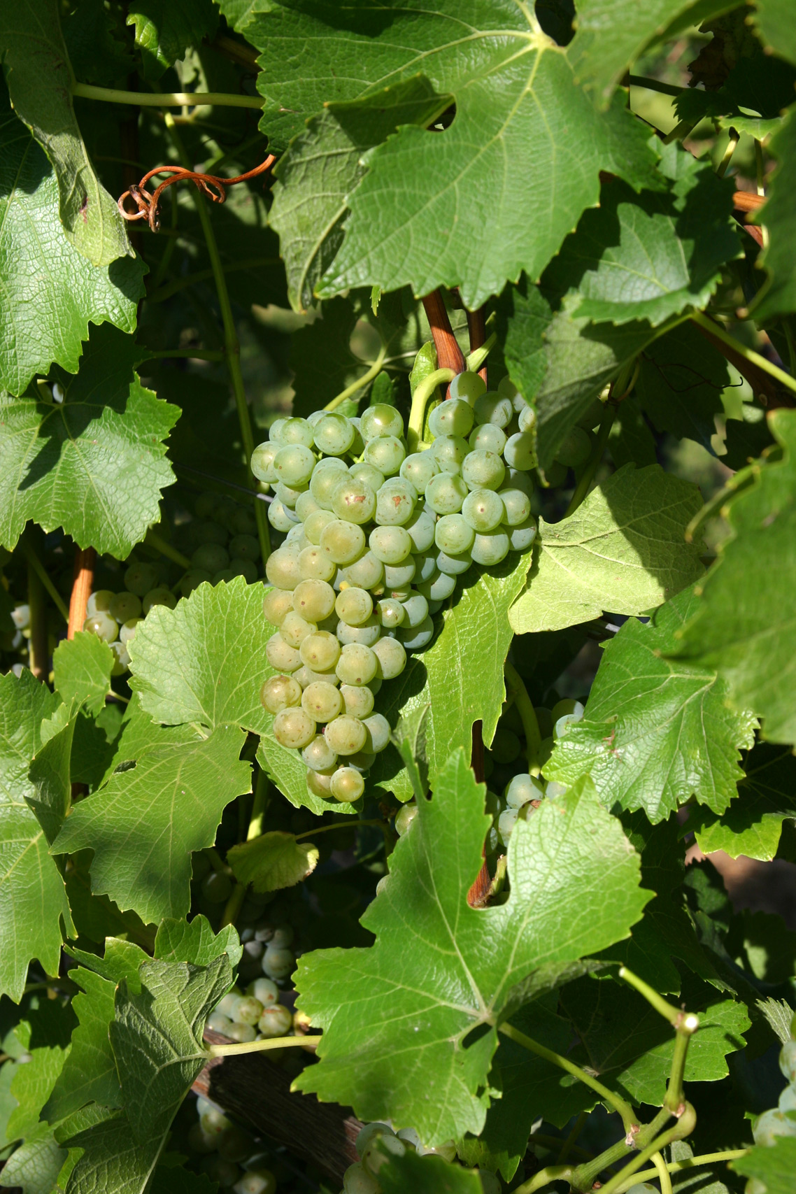 Blätter und Trauben der weißen Rebsorte Bronner